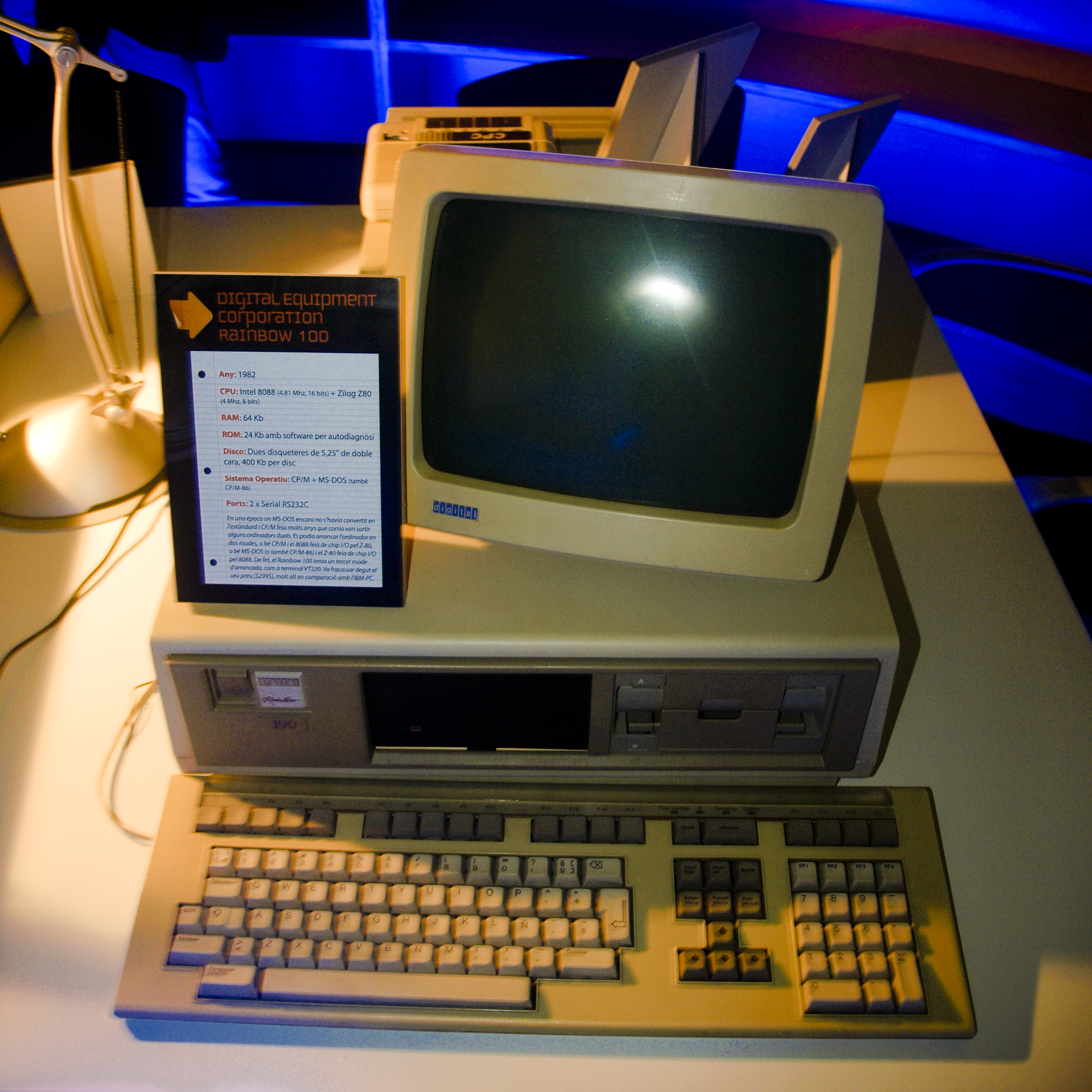 DEC Rainbow 100 Personal Computer in Citilab, Cornellà de Llobregat, Catalonia (Spain)